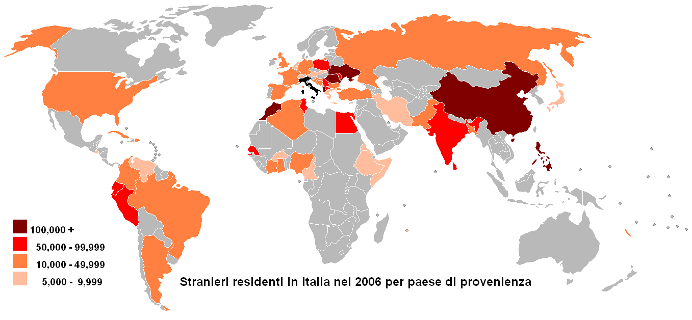 Stranieri residenti in Italia nel 2006 per paese di provenienza